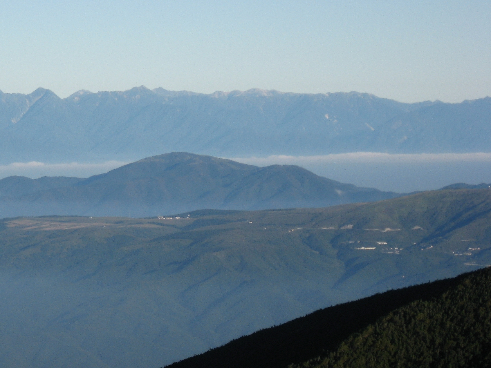 八ヶ岳より望む霧ヶ峰と鉢伏山